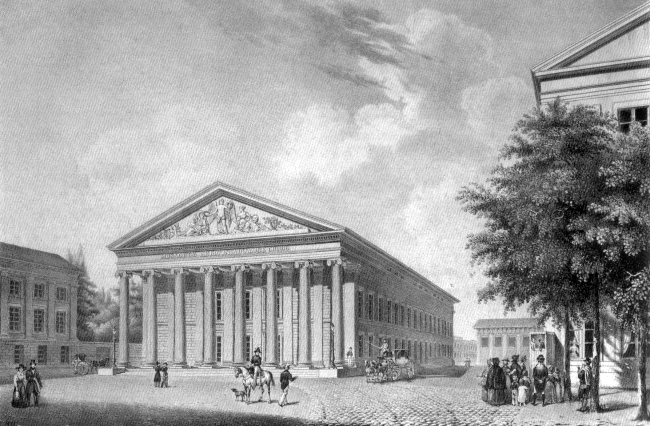 Lithographie de Jean Nicolas Ponsart "Vue de la salle de spectacle à Aix la Chapelle"